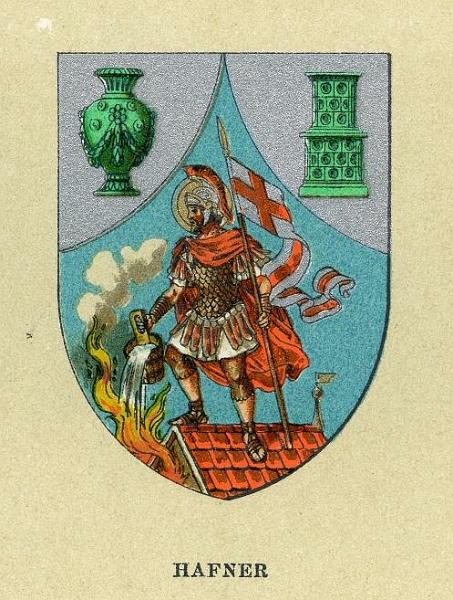 Wappen der Hafner (Wappen der Wiener Gewerbegenossenschaften, um 1900)